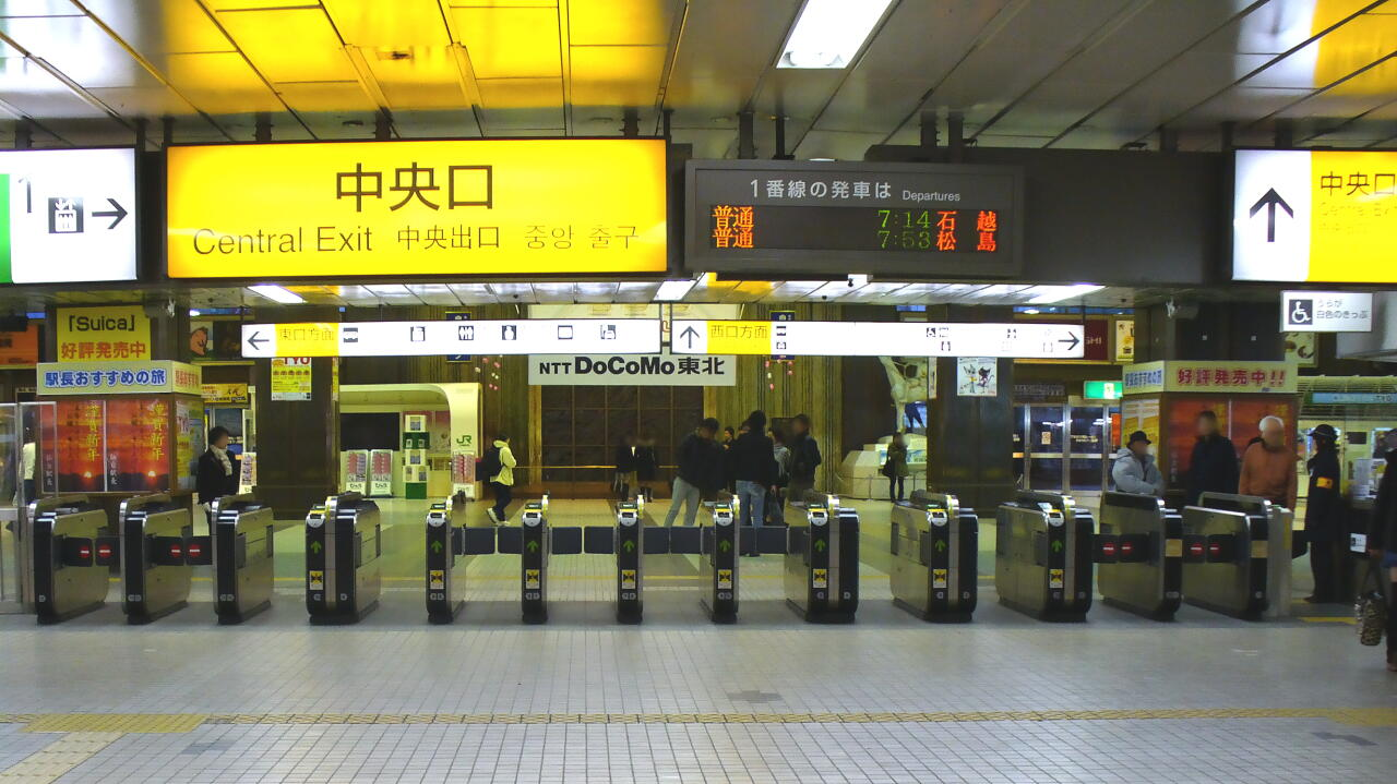 仙台駅中央改札口